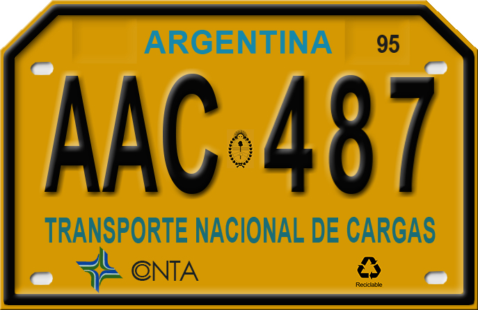 Placa usada por los transportes de carga en Argentina.